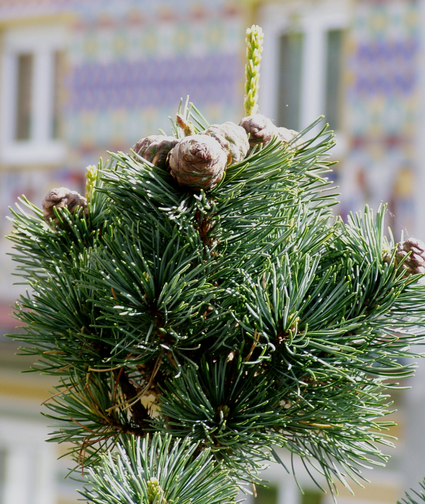 Detail einer blauen Mädchenkiefer Pinus parviflora mit Zapfen